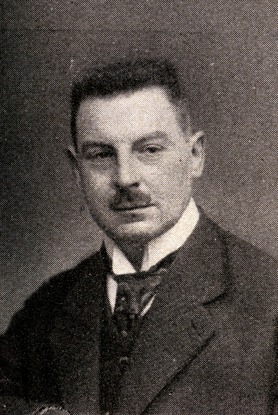 Abgeordneter des Bayerischen Landtags 1920